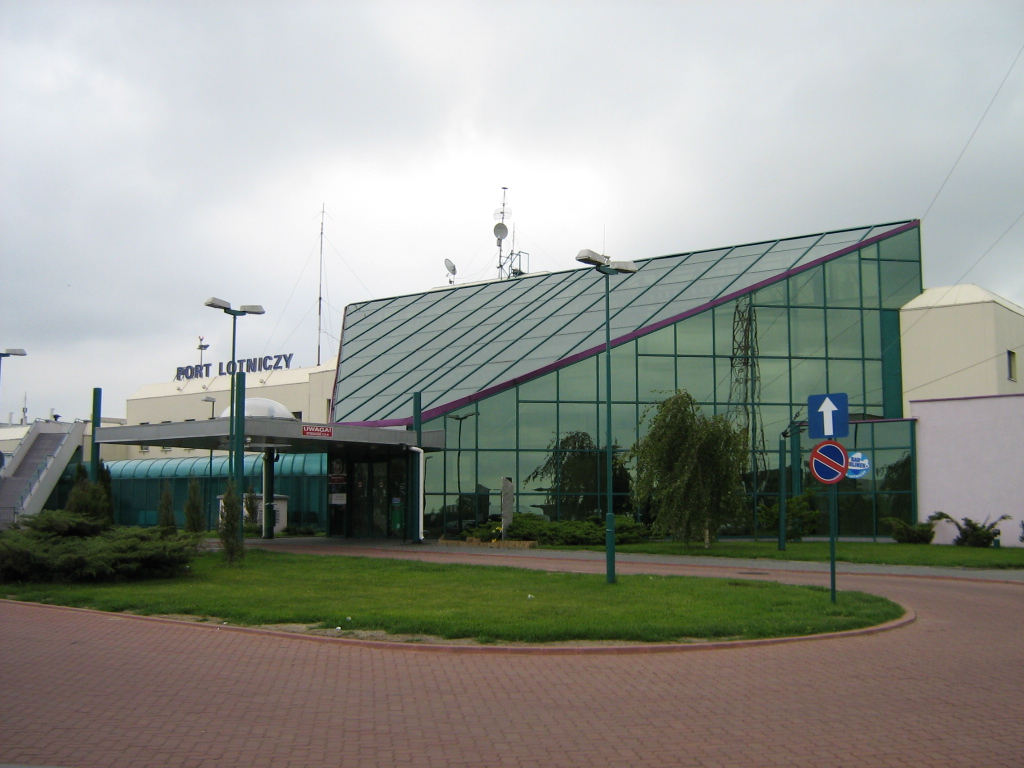 Łódź Airport - Terminal I.